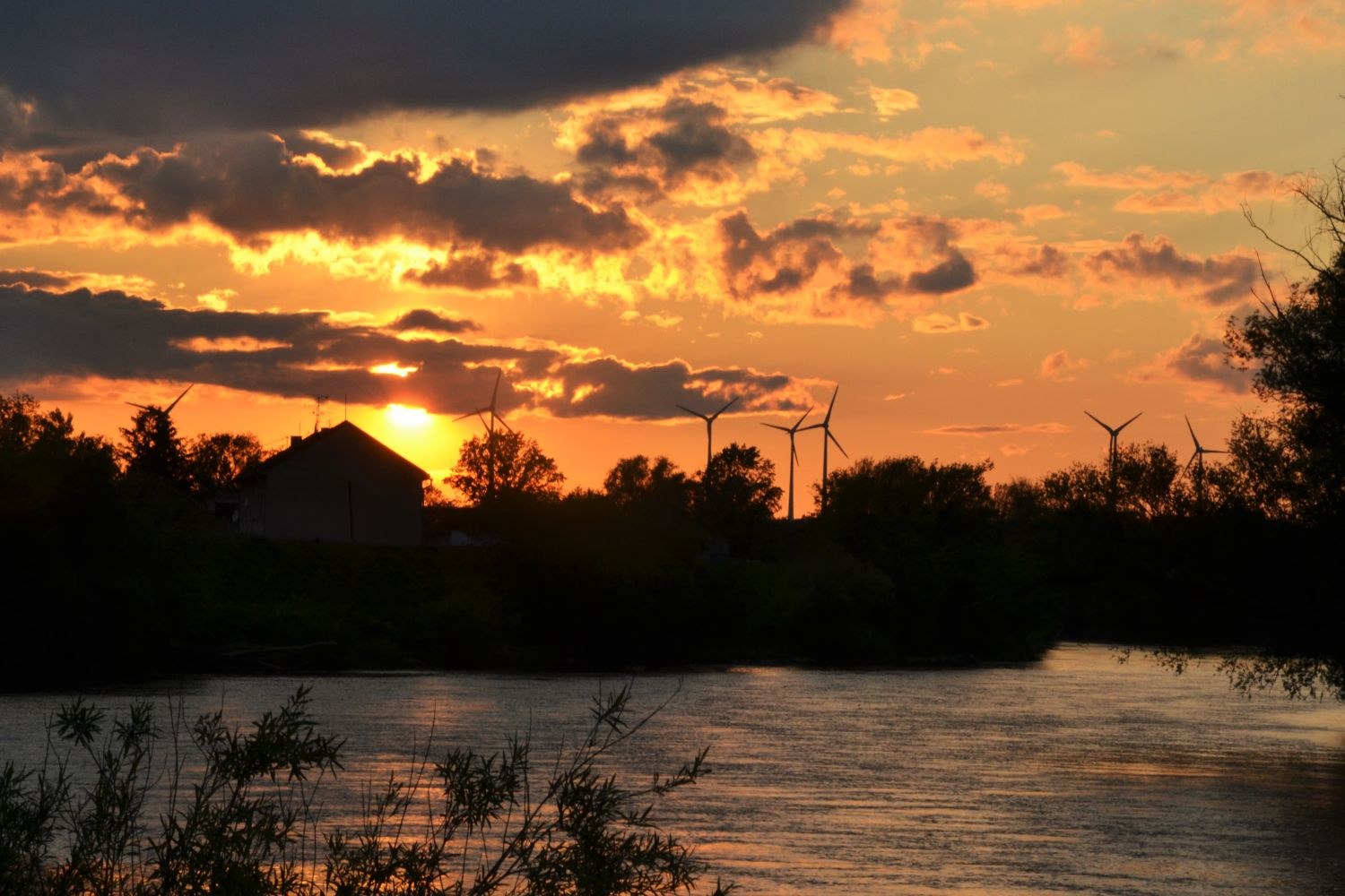 Západ slnka nad riekou Morava v Záhorskej Vsi a pohľad na Rakúsko